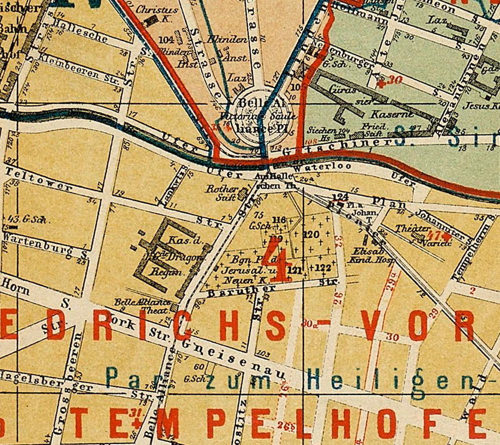 Ausschnitt mit Rother Stift vor dem Halleschen Tor von Neuester Plan von Berlin mit den Königl. Preuss. Standes- und Amtsbezirks-Superintendentur- und Parochie-Grenzen. Im Auftrage des Magistrats nach Amtlichen Materialien bearbeitet und herausgegeben von Julius Straube